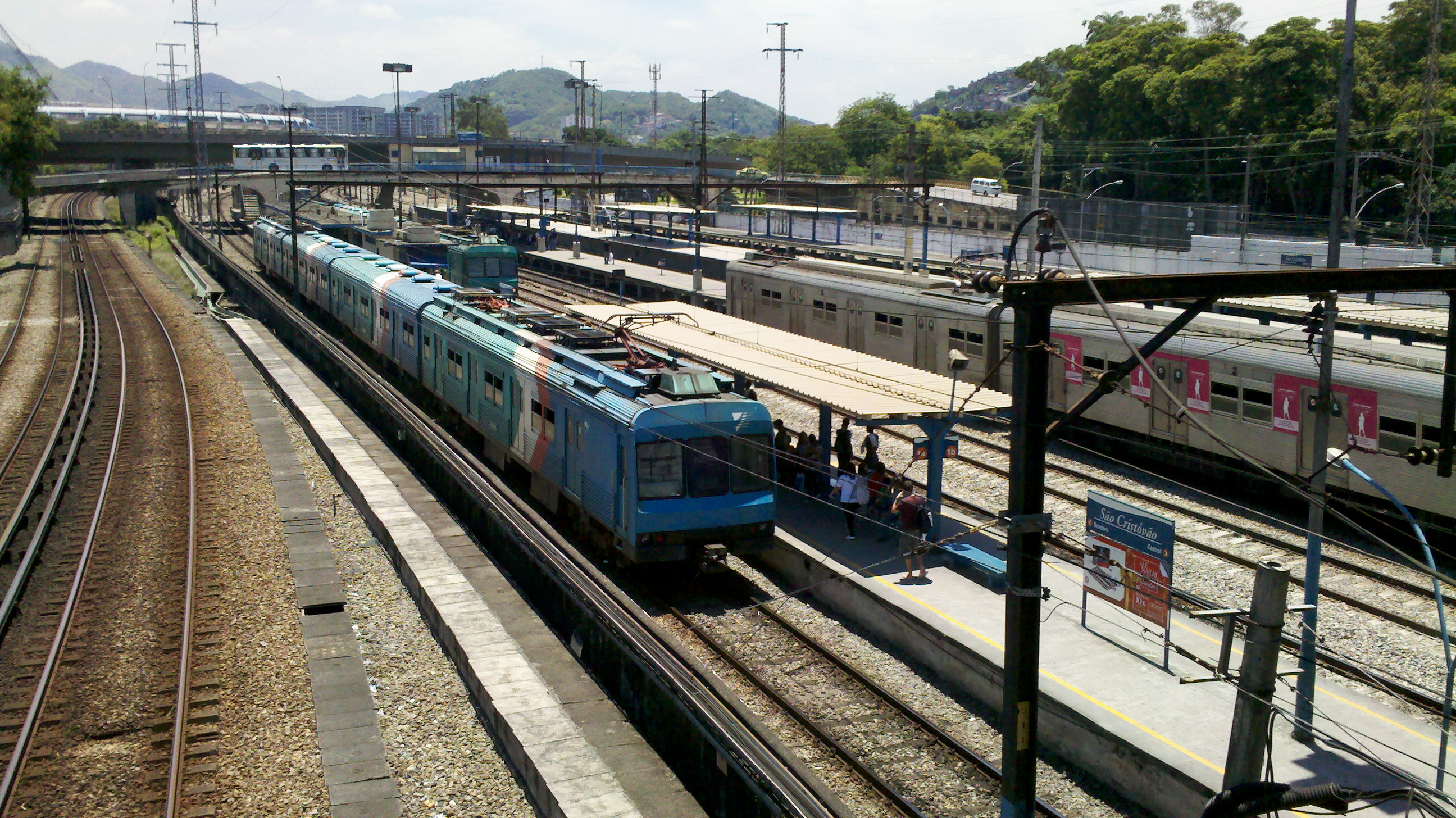 Estação São Cristóvão - Trem da Supervia